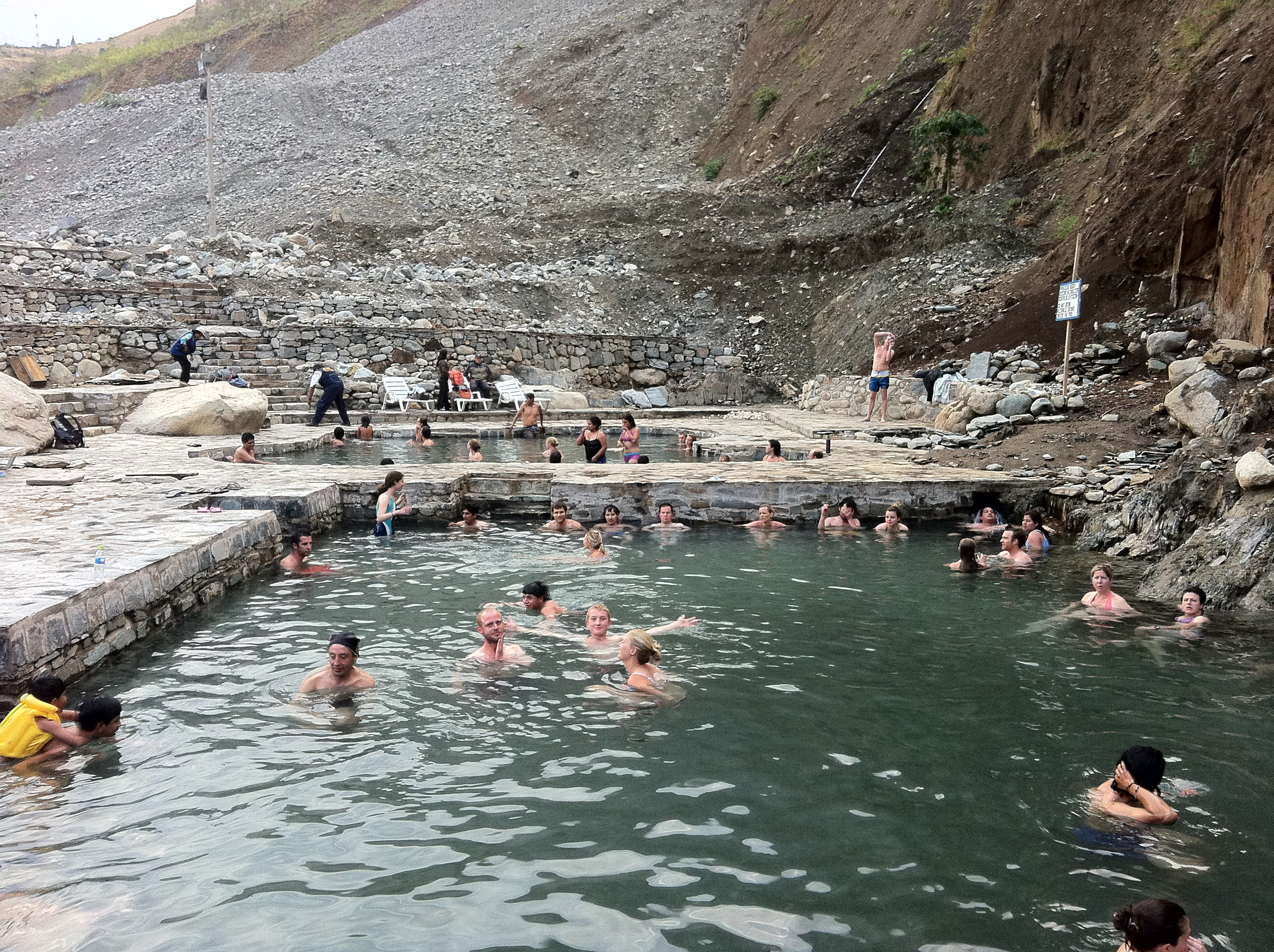 Baños Termales de Cocalmayo (Santa Teresa, La Convención)